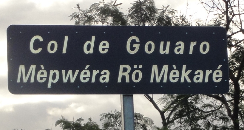 Pancarte Col de Gouaro